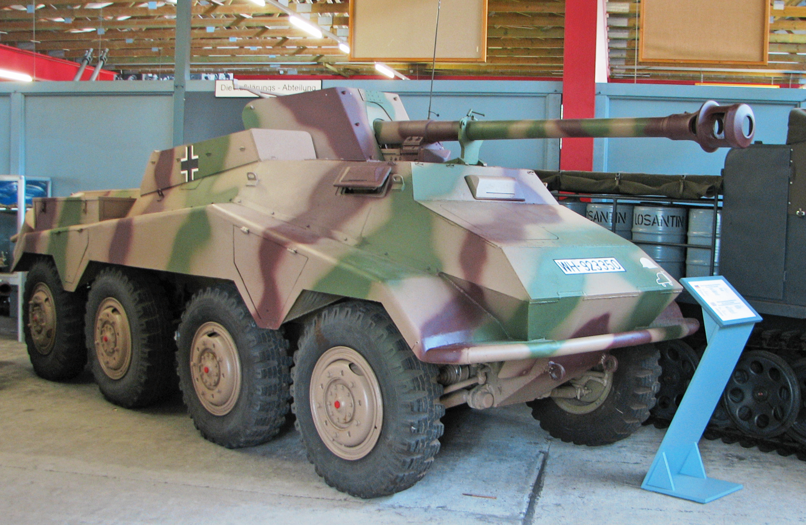 Dieses Bild zeigt ein Sd.Kfz. 234/4 mit 75 mm PaK 40 L/46